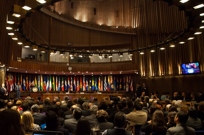 Santiago de Chile, 14 Mayo 2014.- El Presidente de la República, Rafael Correa Delgado, presentó en la Cepal su conferencia magistral "Retos de la Revolución Ciudadana: Neodependencia, neocolonialismo, y cambio estructural". Foto:Nina Zambrano Díaz. Cancillería del Ecuador.